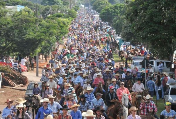 Cavalgada de Serra dos Amigos - Serra dos Dourados